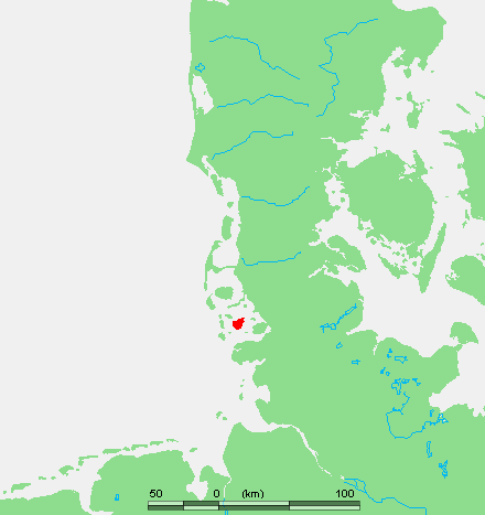 Wadden - Pellworm